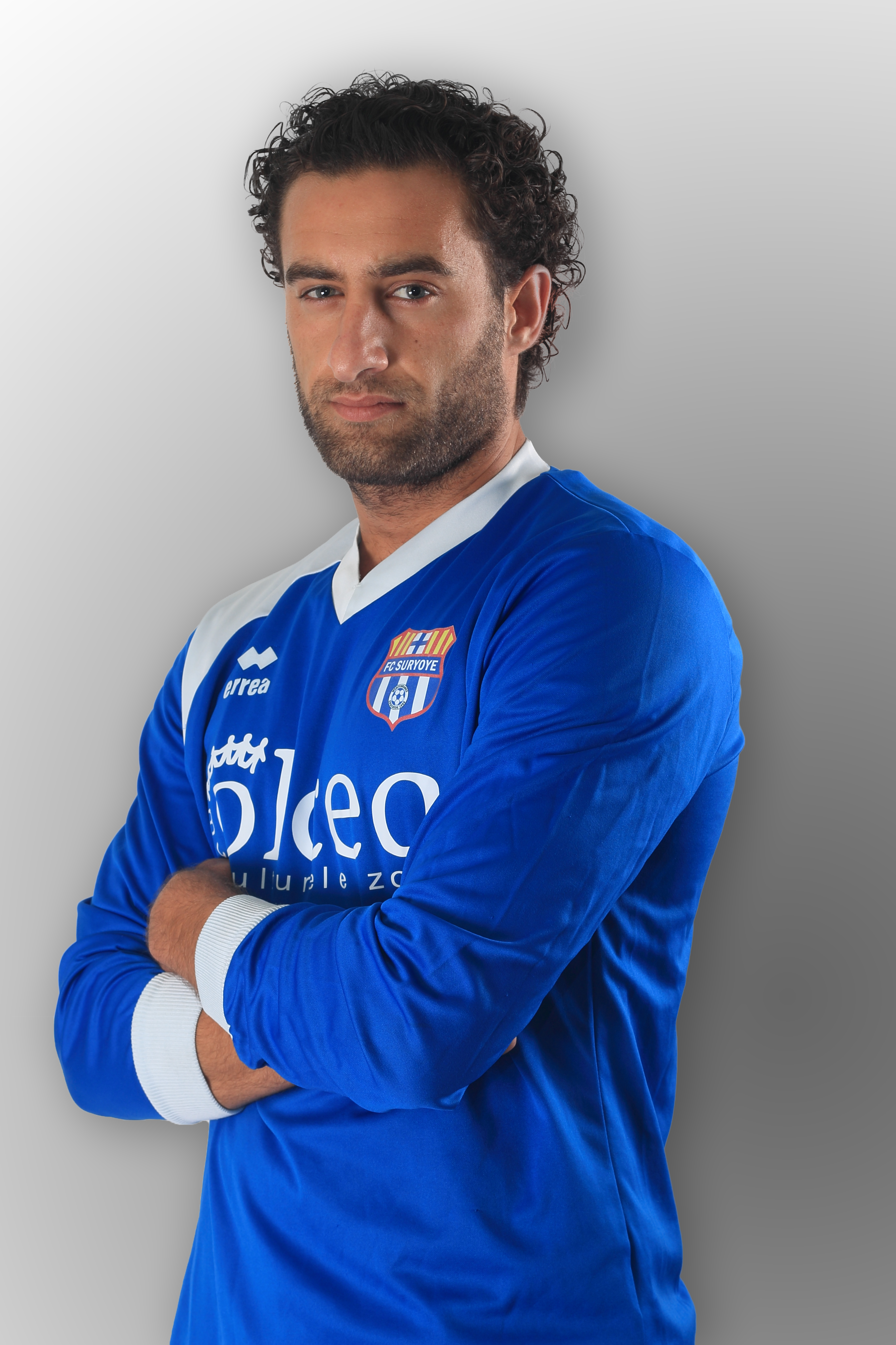 Christiaan Cicek